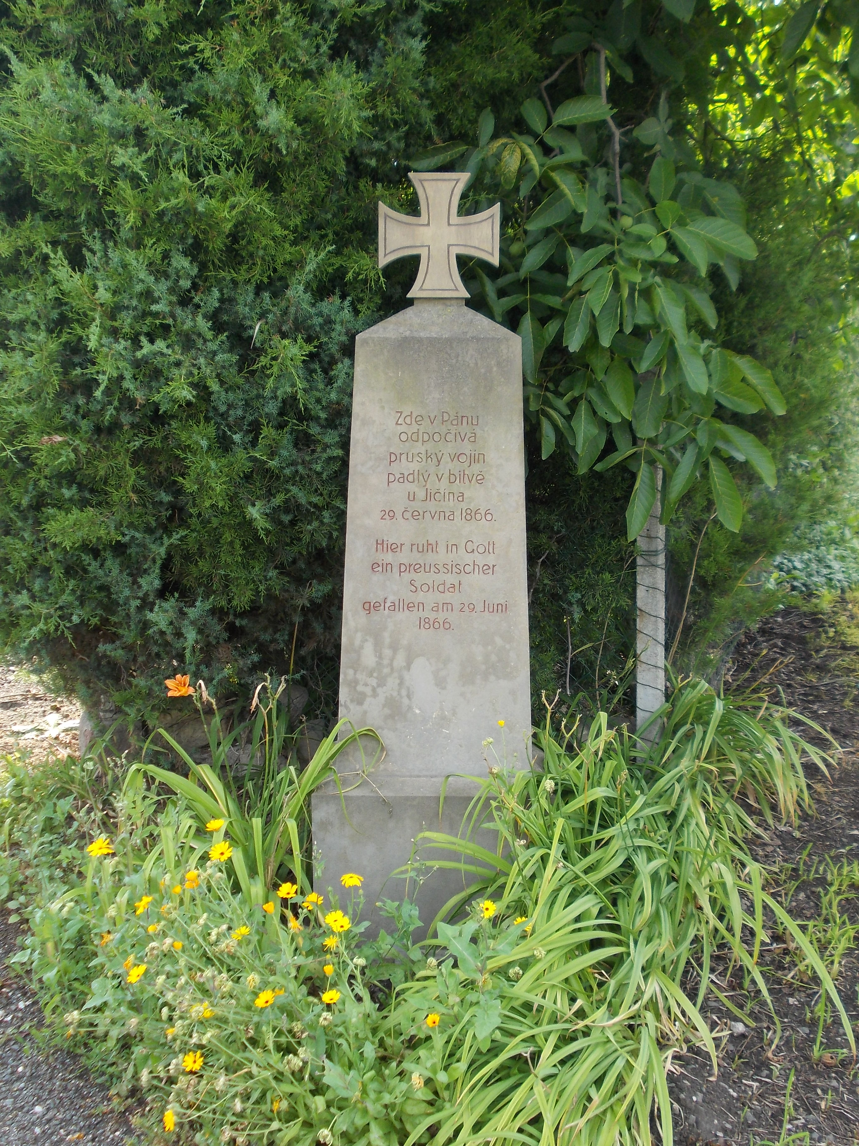 Kněžnice - pomník bitvy u Jičína